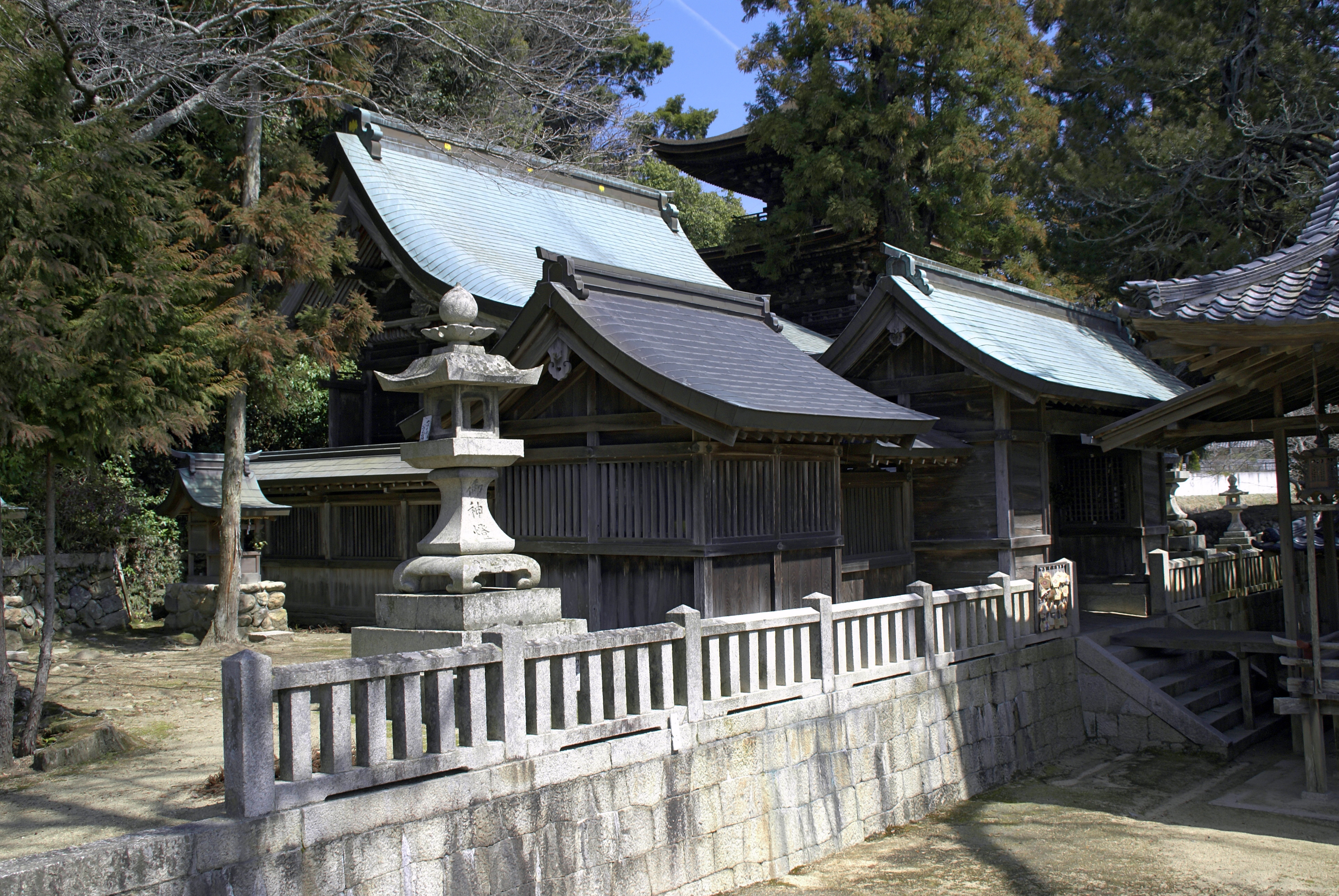 Rokujo_hachiman-jinja in Kobe, Hyogo prefecture, Japan